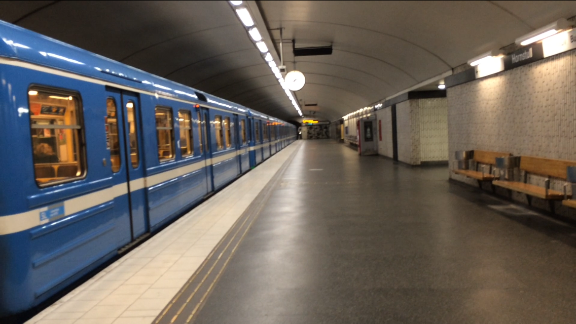 C6 vagn lämnar Hornstull